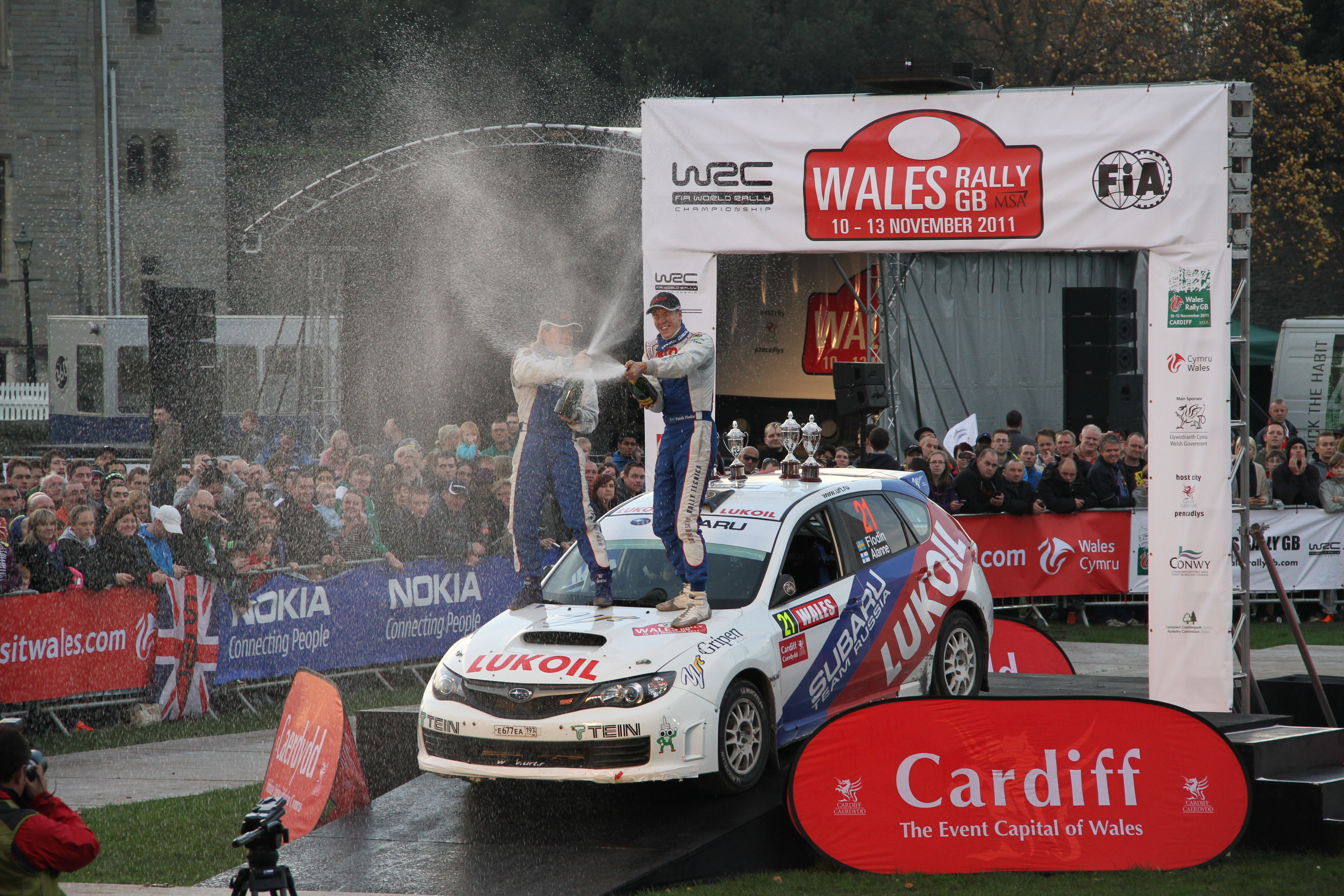 Wales Rally GB 2011. Patrik Flodin - winner of P-WRC, and vice champion in 2011 season.